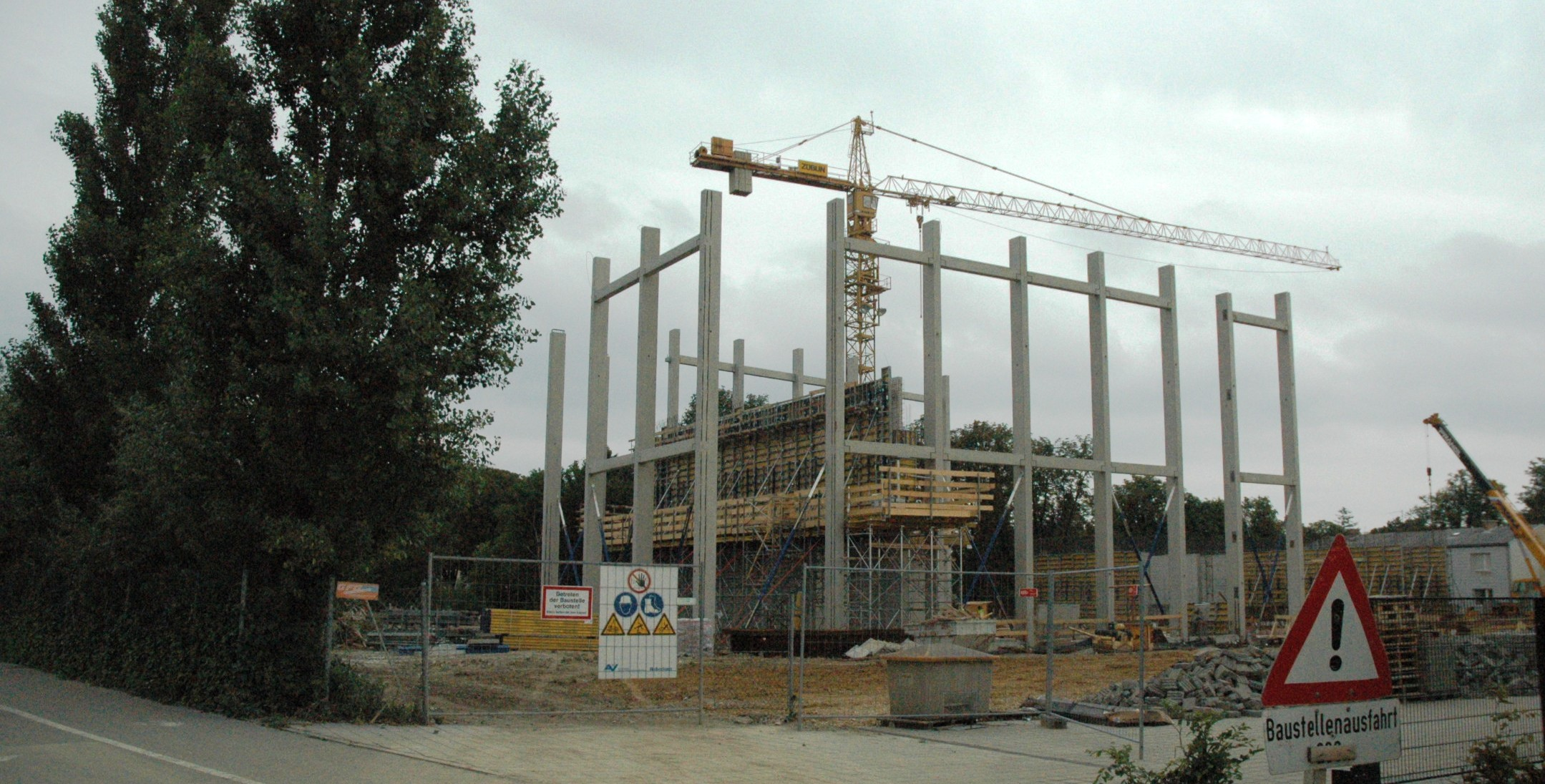 Aufnahme während der Errichtung des Biomassekraftwerkes Mödling der EVN Wärme mit Betonfertigteilen